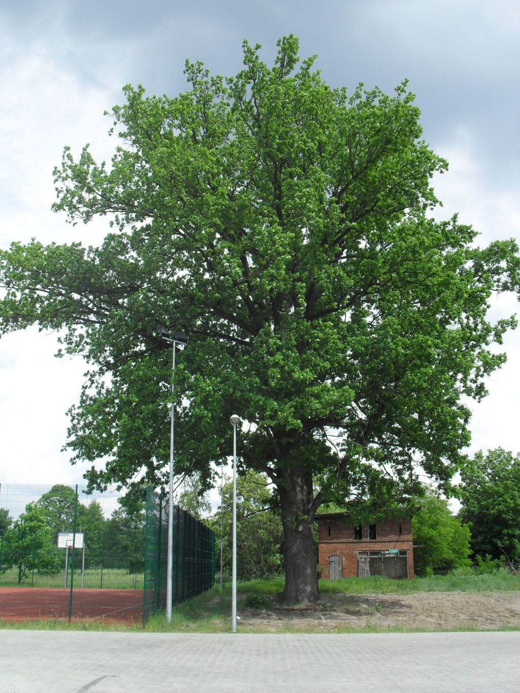 Dąb szypułkowy - -pomnik przyrody - w Cielu. Obwód w 2012 - 392 cm.